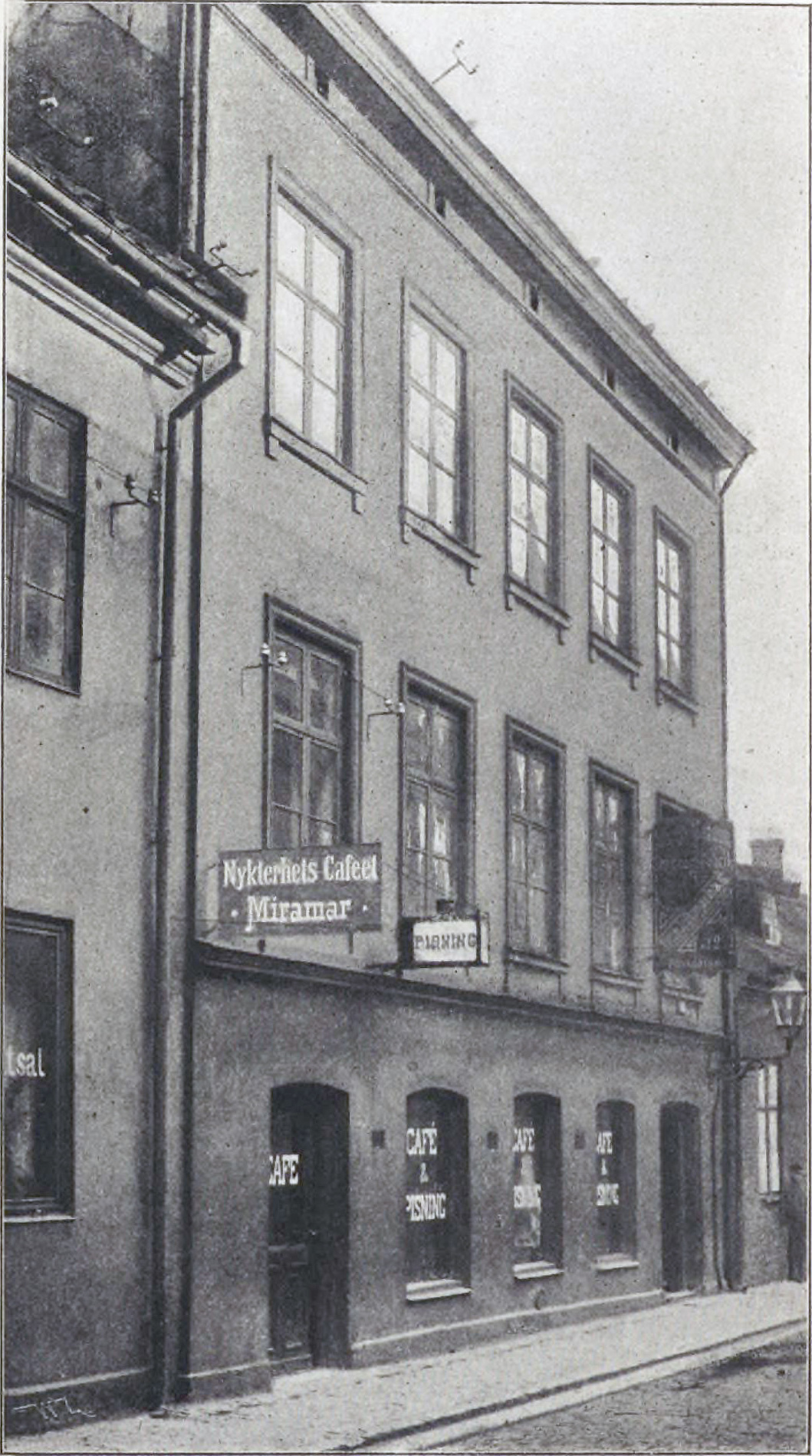 Den före detta Sillgateteaterns hus